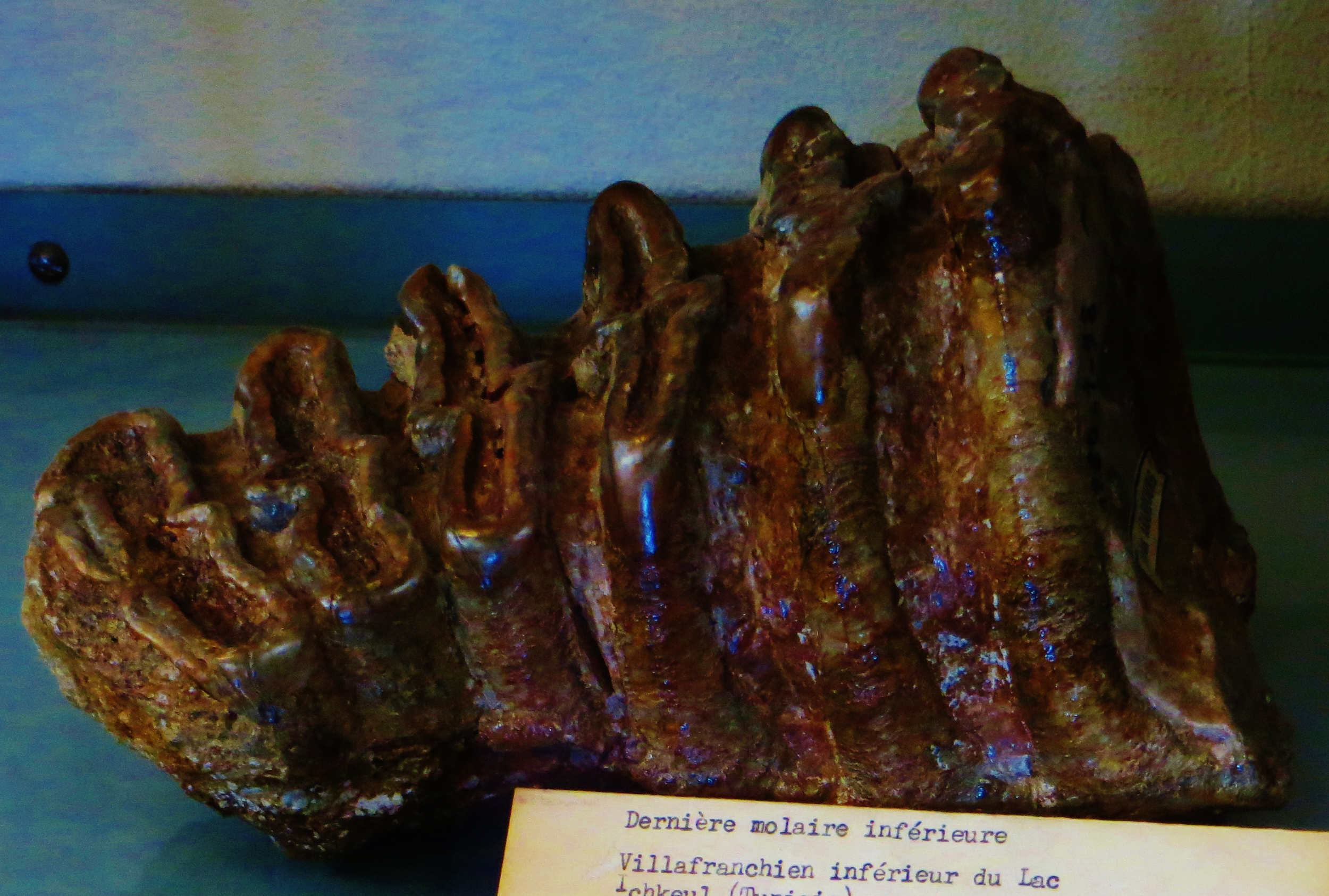 Fossil of Mammuthus, an extinct mammal- Took the photo at Musee d'Histoire Naturelle, Paris